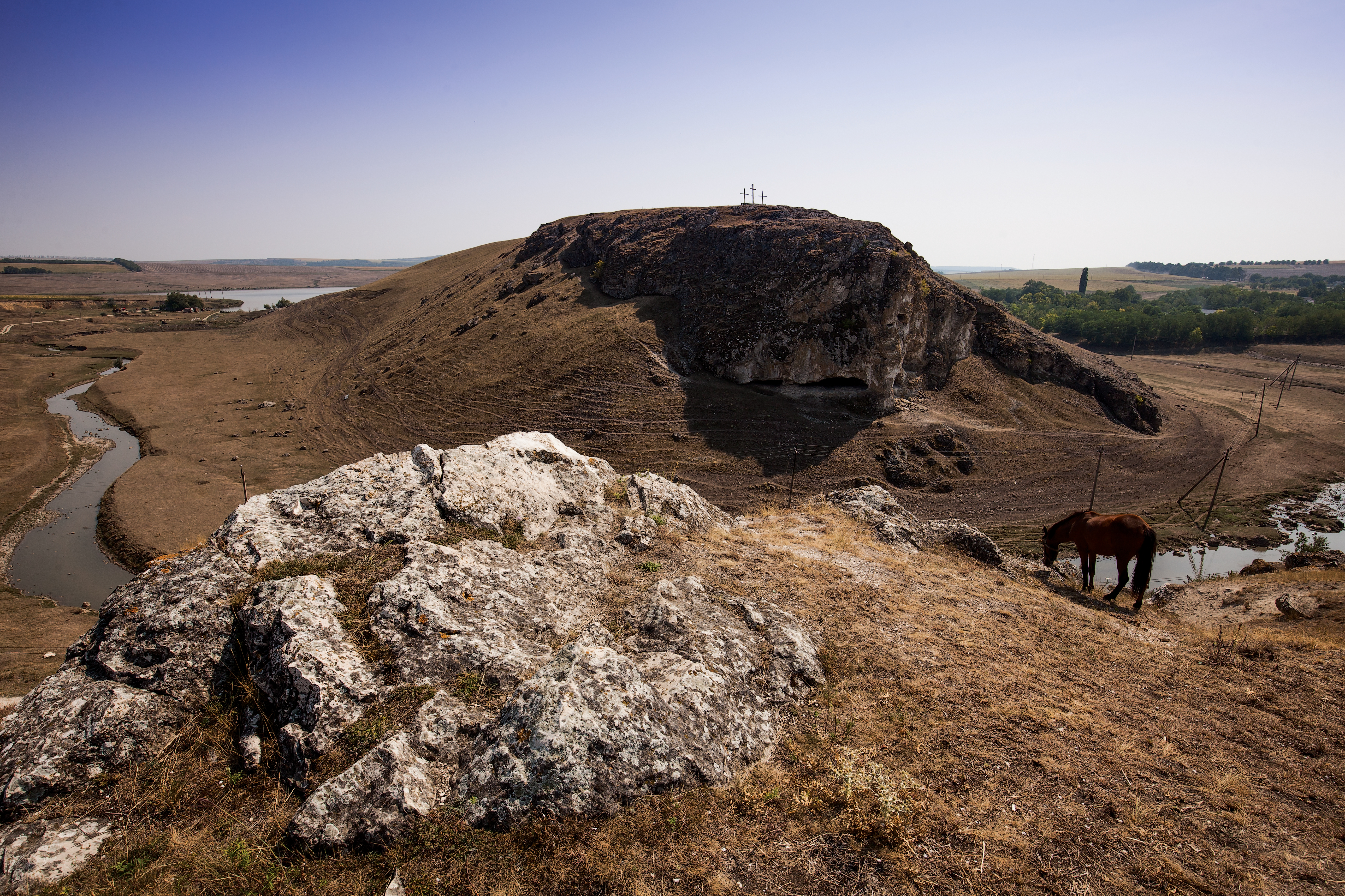 Cheile Butești, monument al naturii amplasat în raionul Glodeni, la sud de satul Butești (cod MD-GL-mn.A-038) A-038